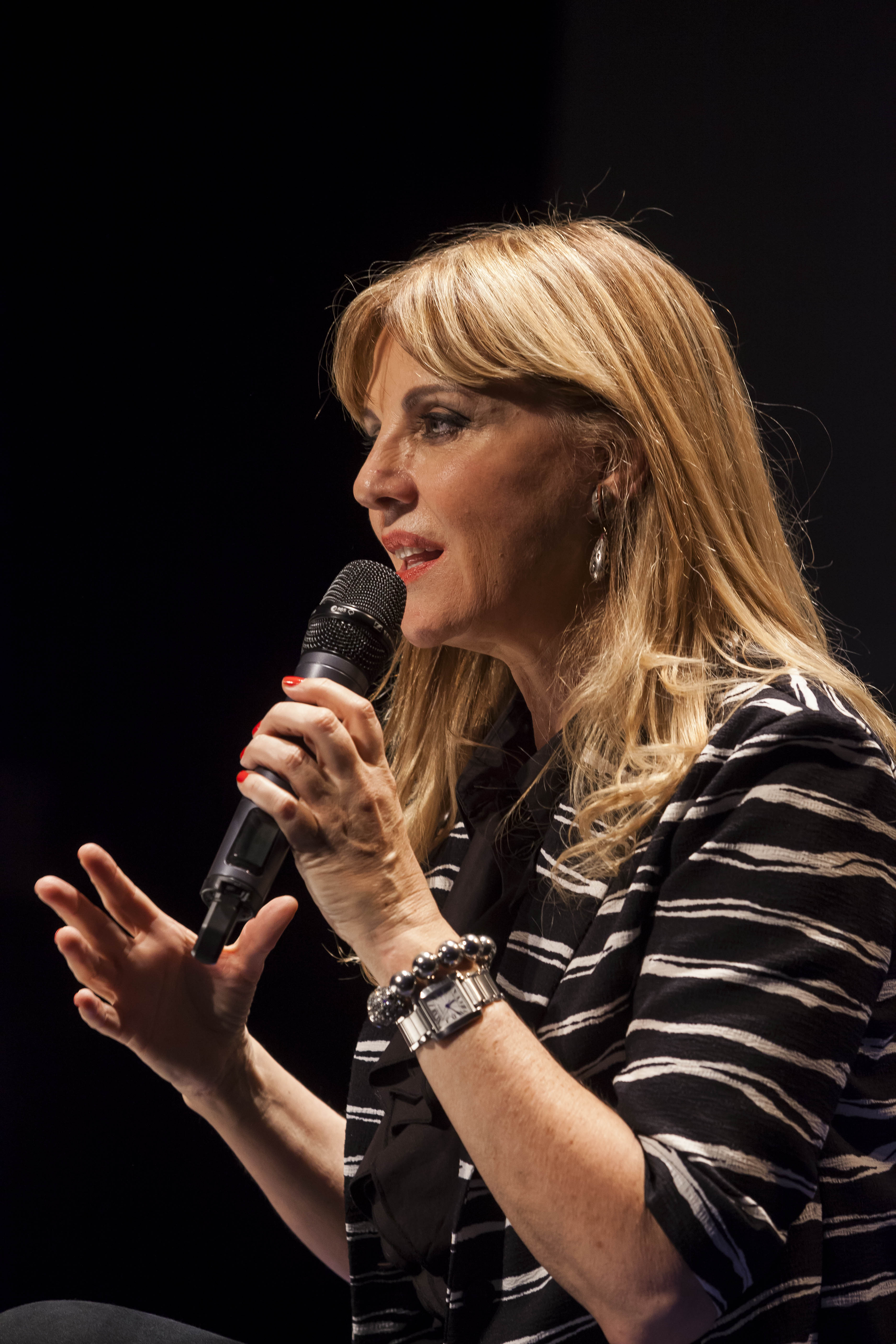 Teté Coustarot en la Universidad Metropolitana para la Educación y el Trabajo, en el marco del ciclo Historias de Pasión Xeneize. Buenos Aires, 21 de mayo de 2015.